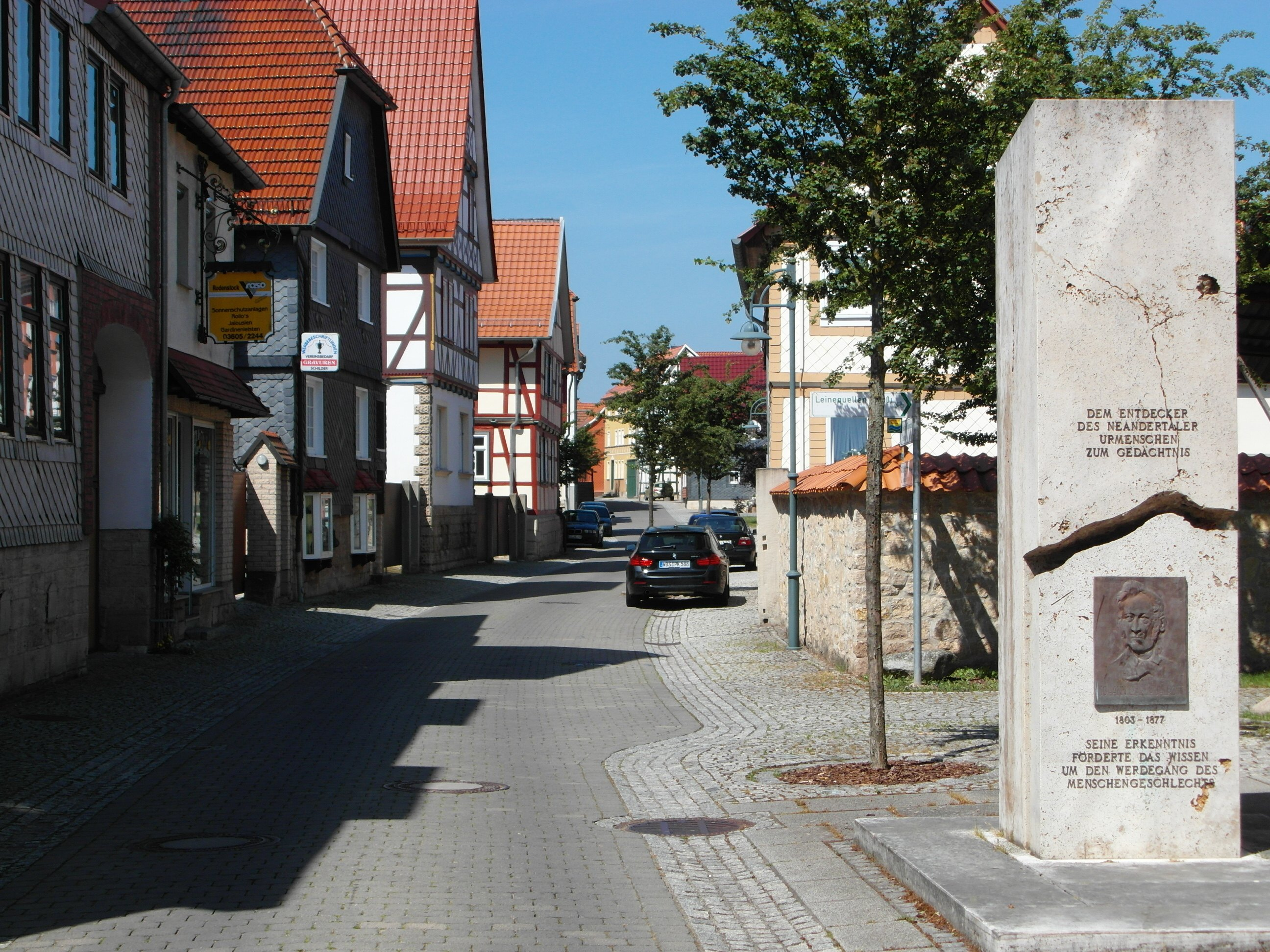 Denkmal für den Entdecker des Neandertaler-Urmenschen aus Leinefelde